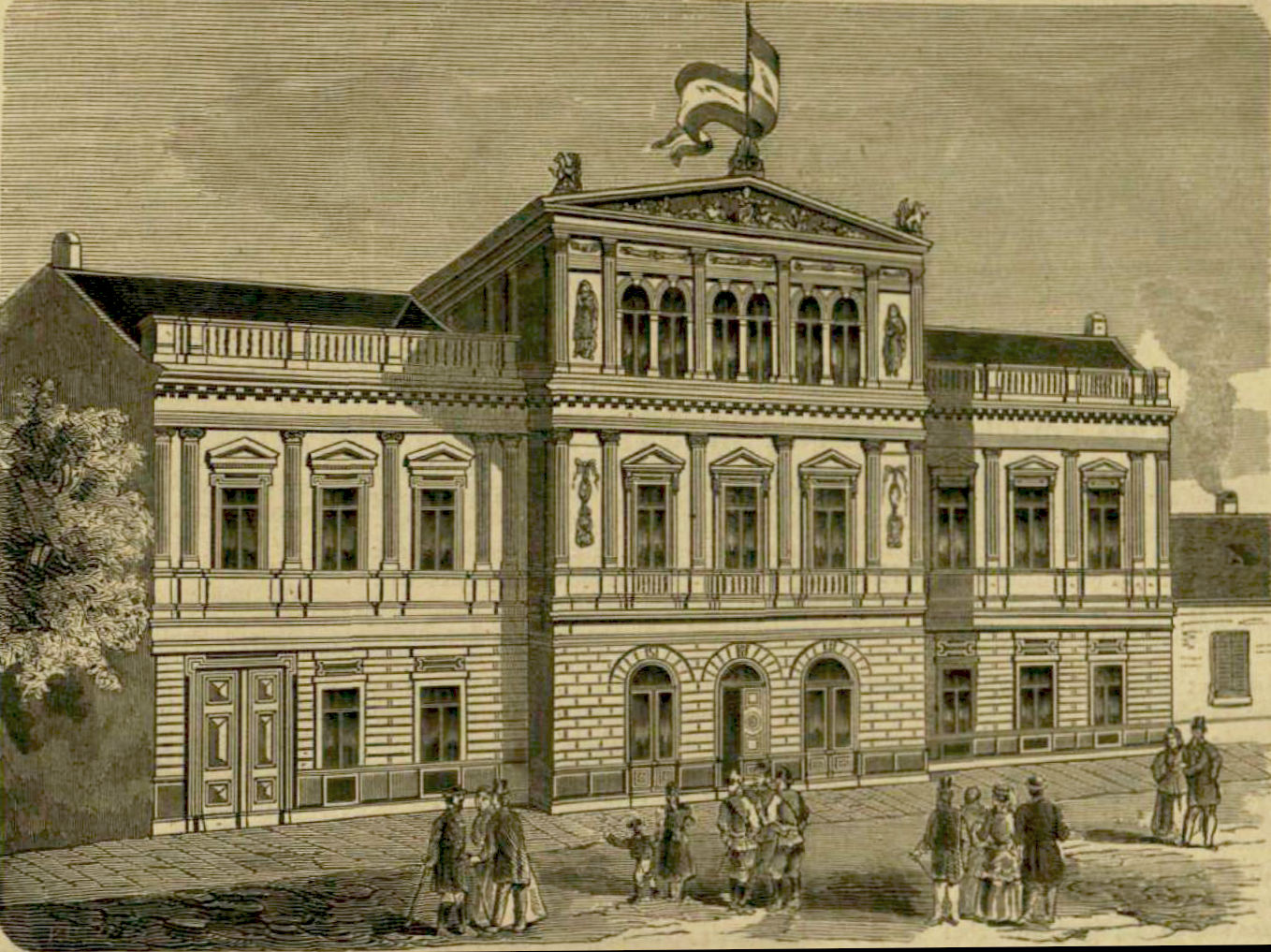 A Nemzeti Torna Egylet 1870-ben felavatott csarnoka, amelyet csak a korabeli lipcsei tornacsarnok haladt túl a nagyságában, Budapesten, a VIII. kerület Ősz utcában a mai Szentkirályi utcában .